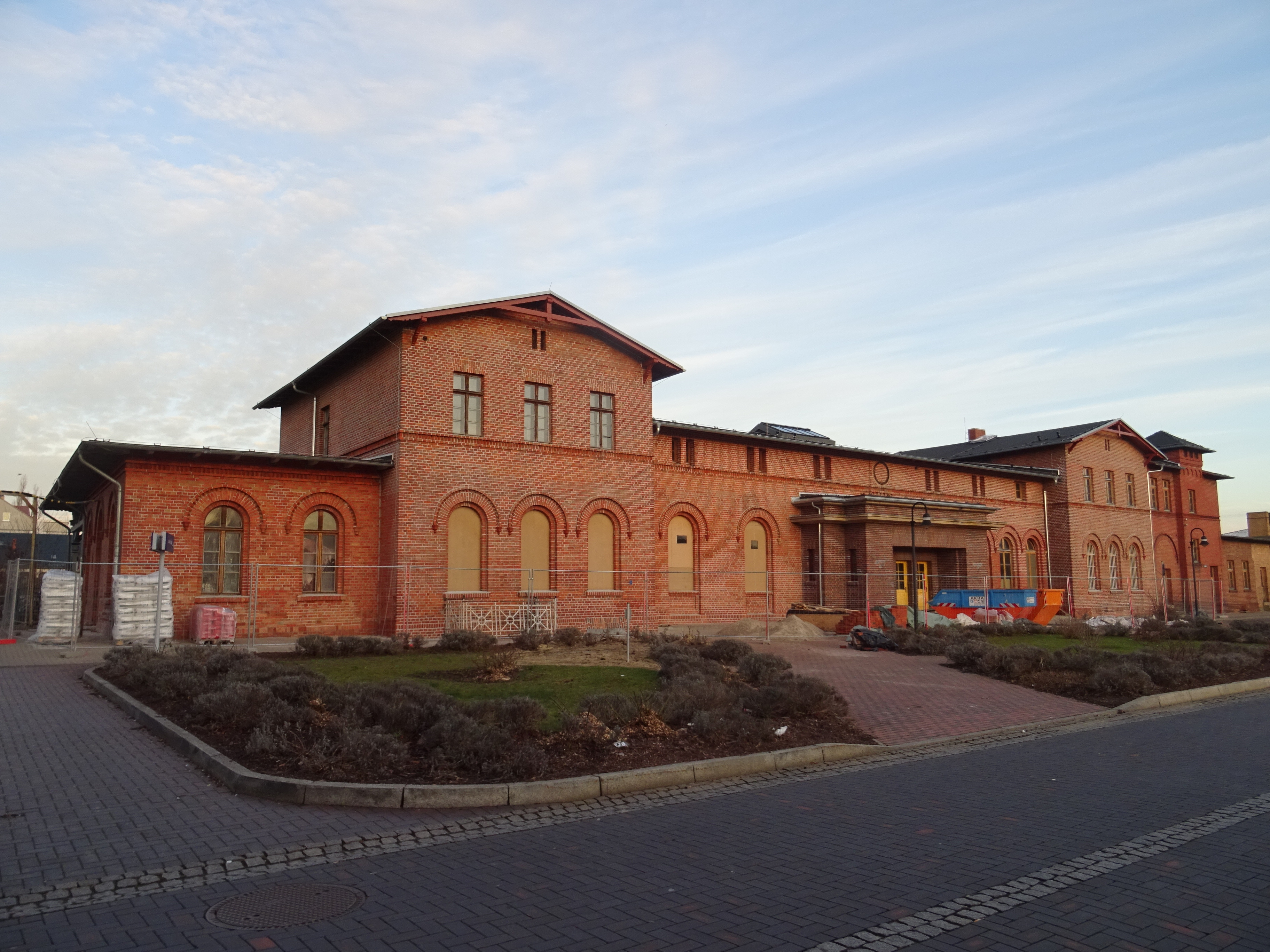 Bahnhof Bad Freienwalde, (weitgehend) saniertes Empfangsgebäude, Straßenseite, 2020